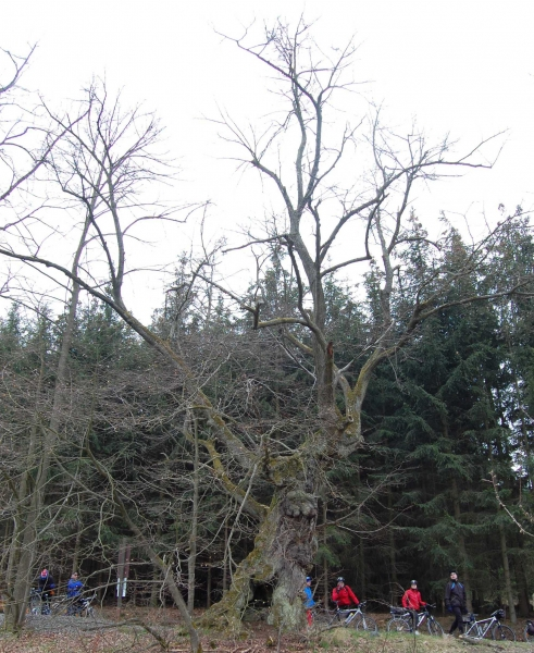 Památná lípa u Mrtole východně od Snopoušov při pohledu z pole